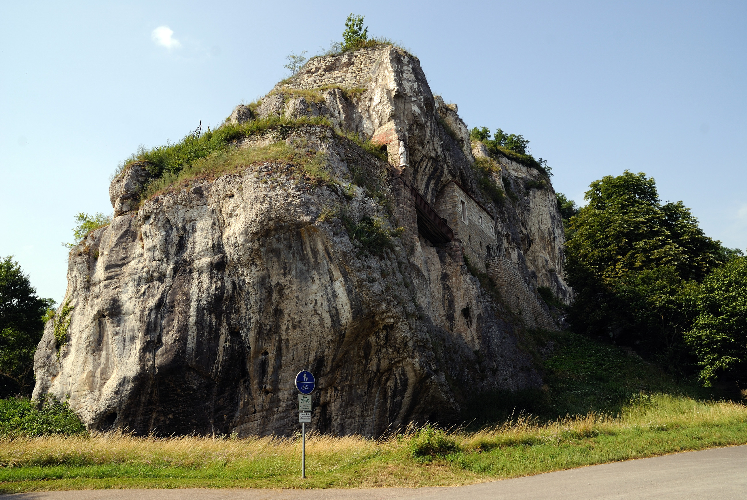 Isteiner Klotz mit der St. Veitskapelle